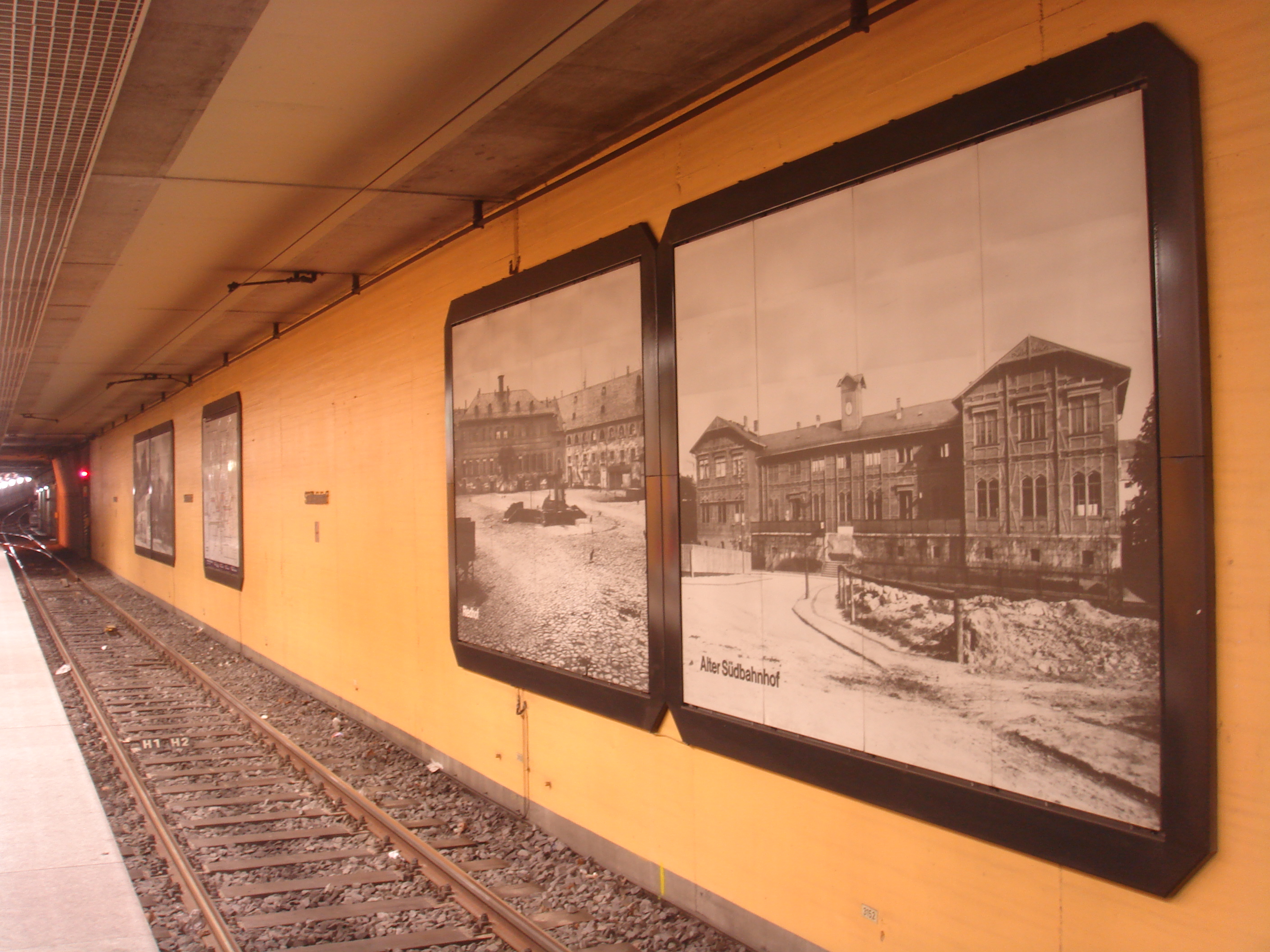 Südbahnhof Frankfurt am Main, Tiefbahnhof